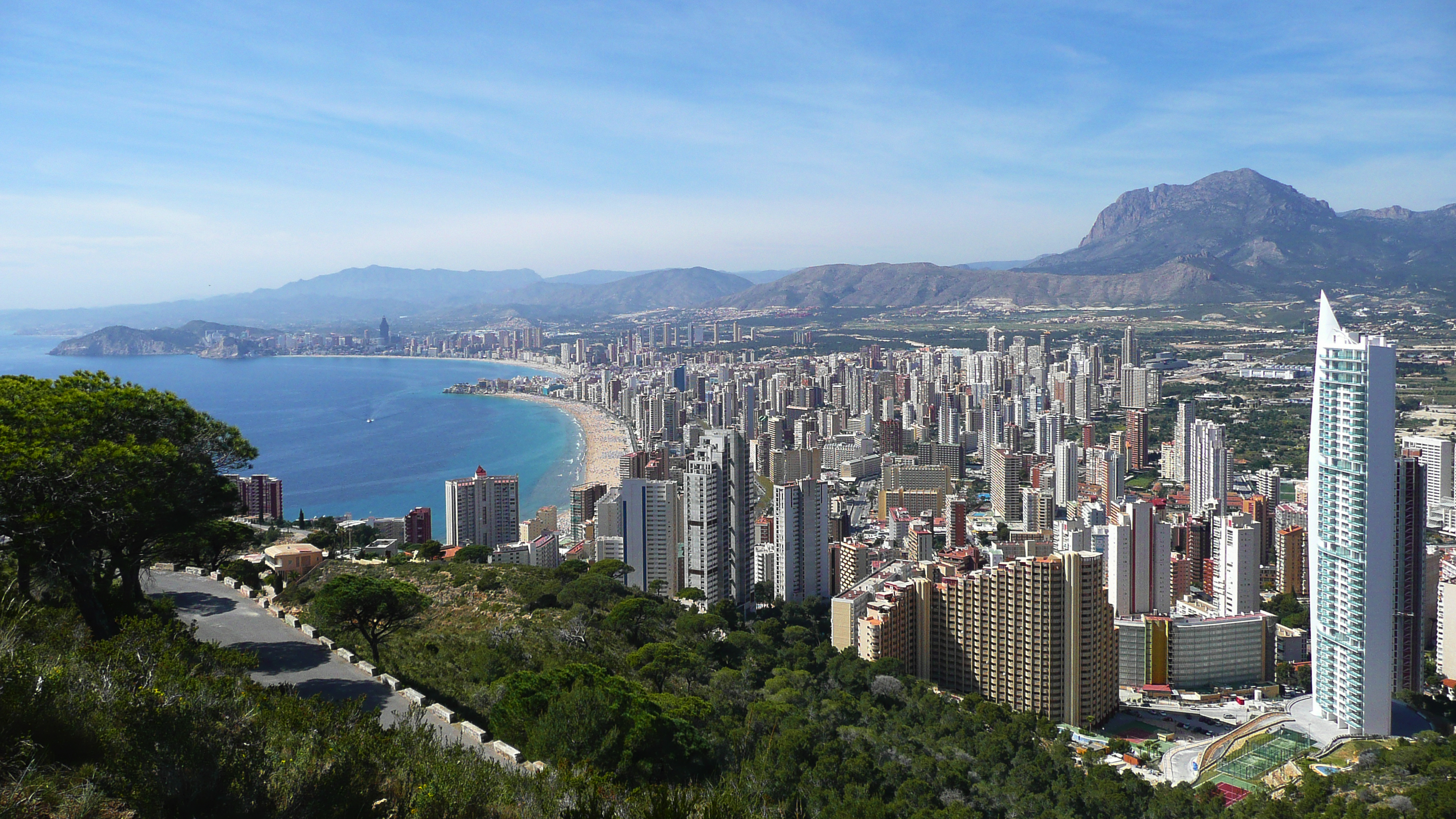 Foto panorámica de Benidorm, visto desde la Cruz